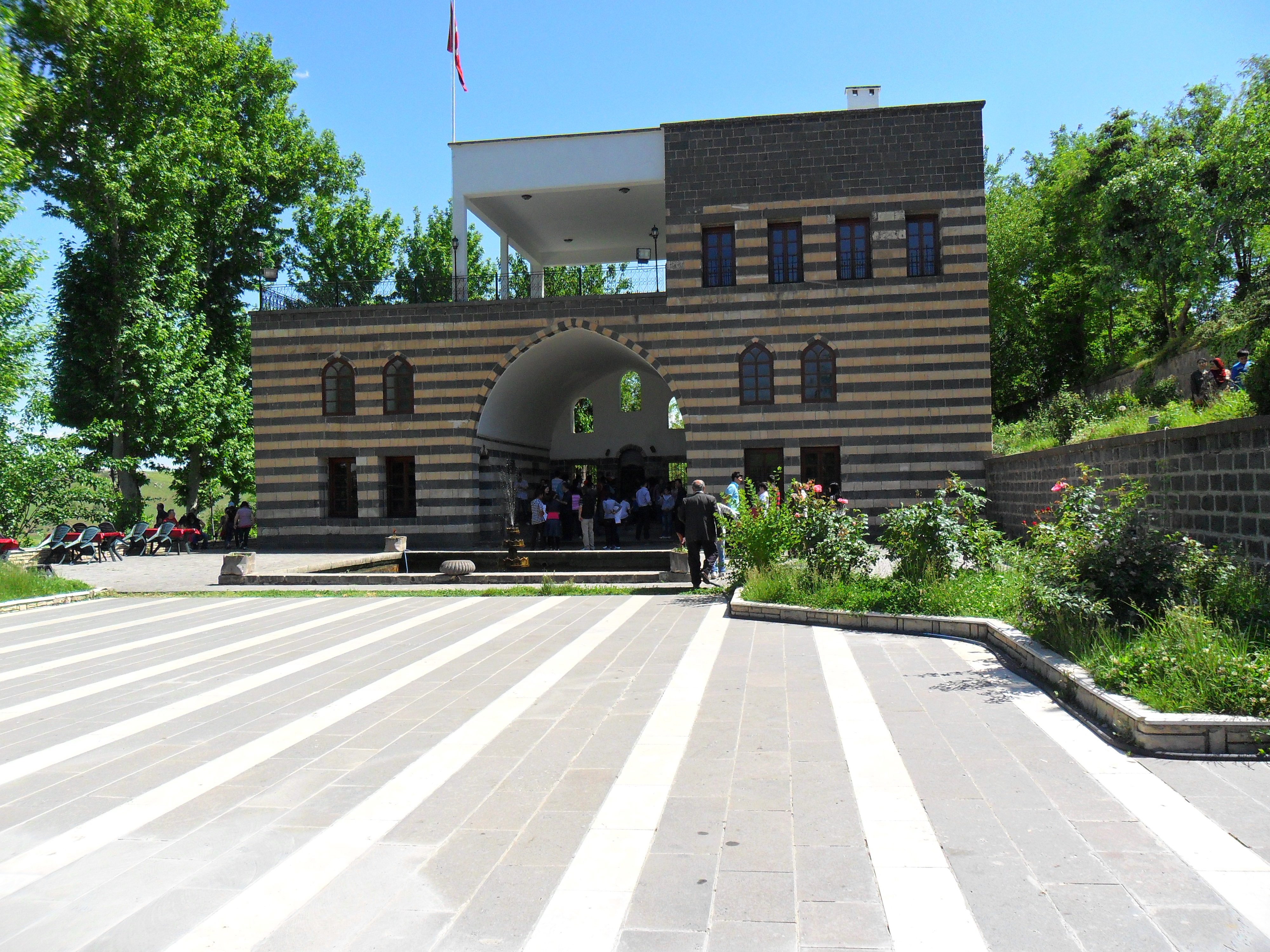 Gazi Köşkü, Diyarbakır